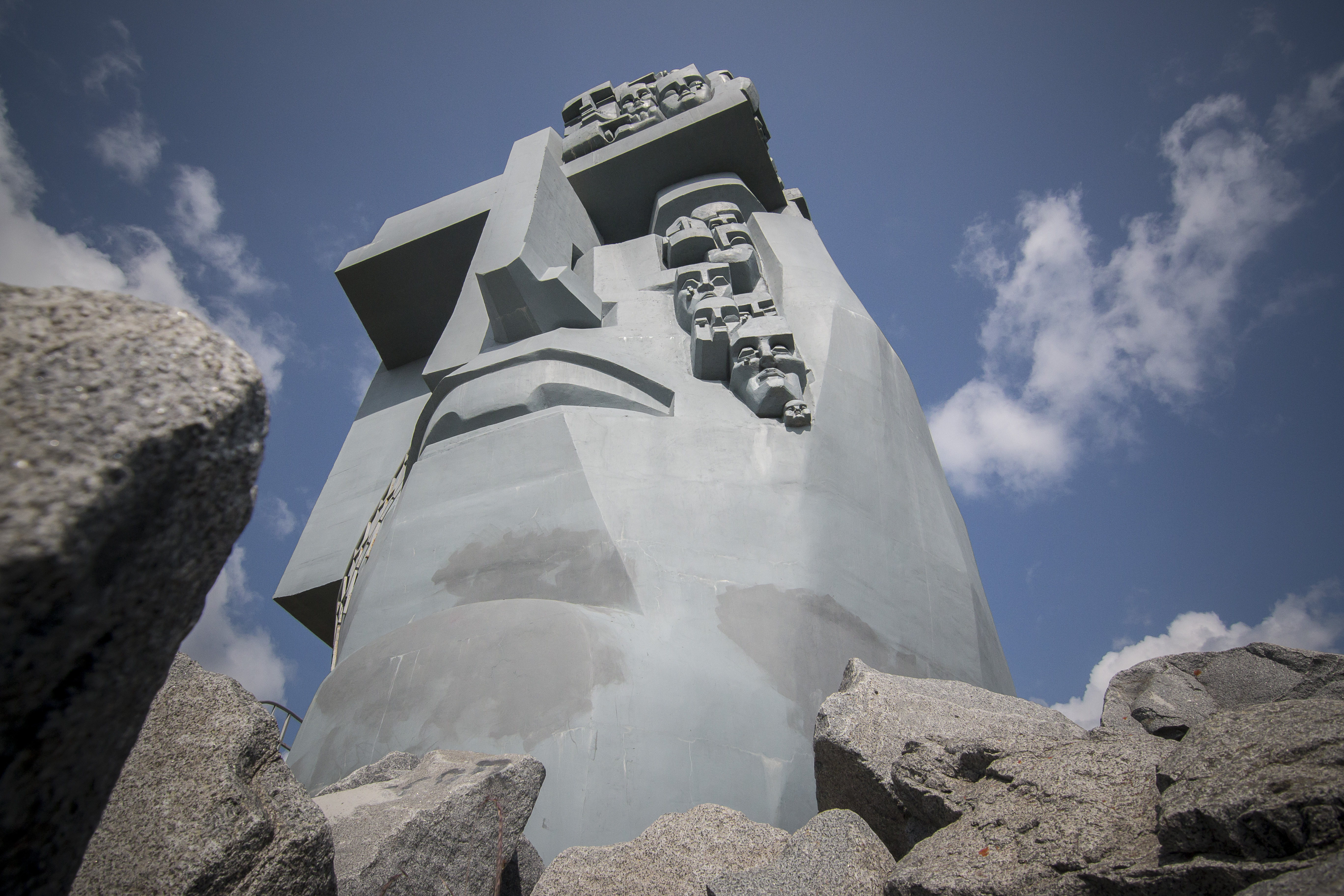 Мемориальный комплекс жертвам политических репрессий «Маска Скорби»: сопка Крутая, Магадан, Магаданская область